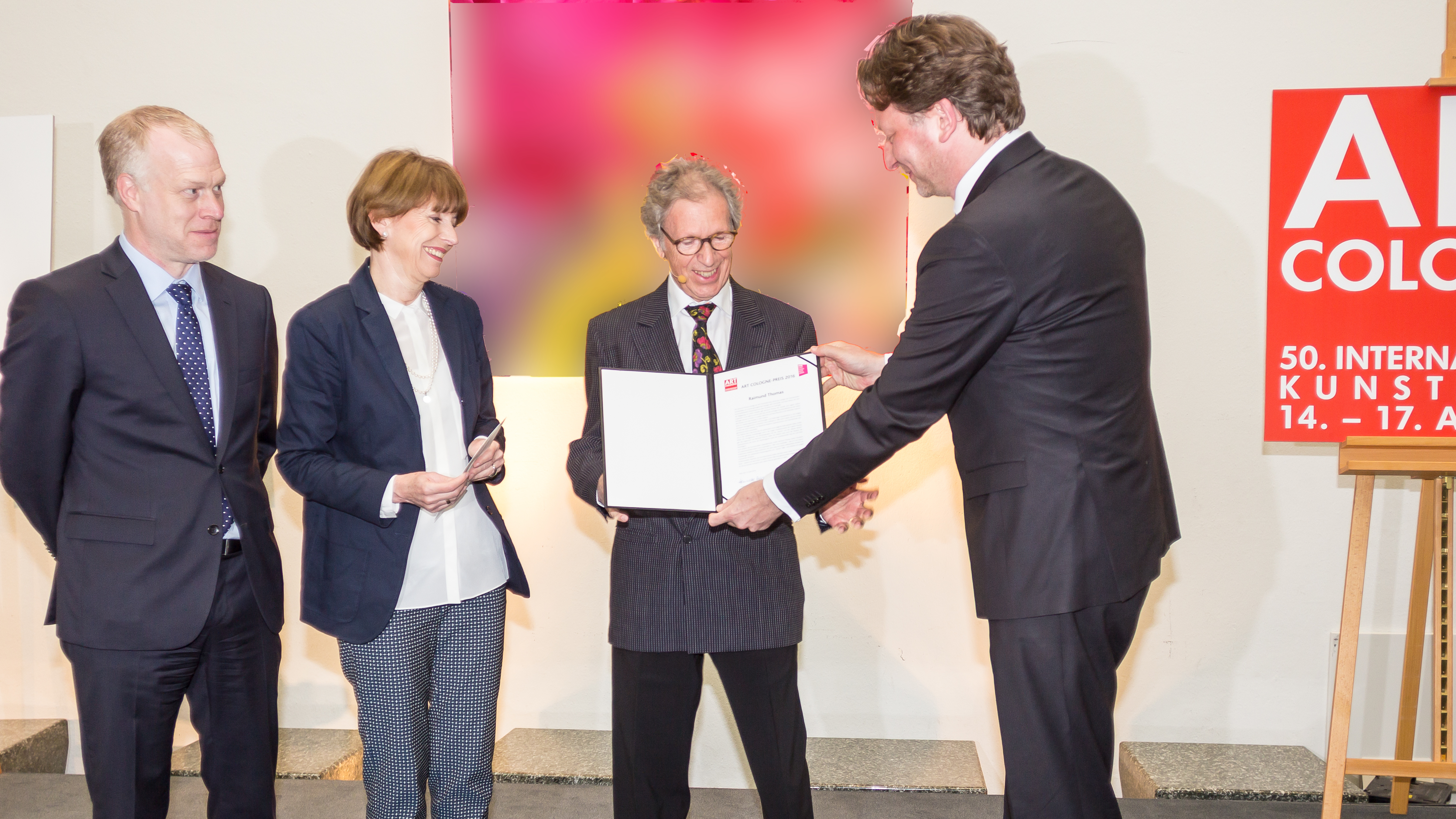 Verleihung des Art Cologne Preises 2016 an den Galeristen und Kunsthändler Raimund Thomas in der Piazette des Historischen Rathauses von Köln Foto: Überreichung des Preises an Raimund Thomas durch Oberbürgermeisterin Henriette Reker (2.v.l.) und Kristian Jarmuschek, Vorsitzender des Bundesverbandes Deutscher Galerien und Kunsthändler (BVDG) (1.v.r).